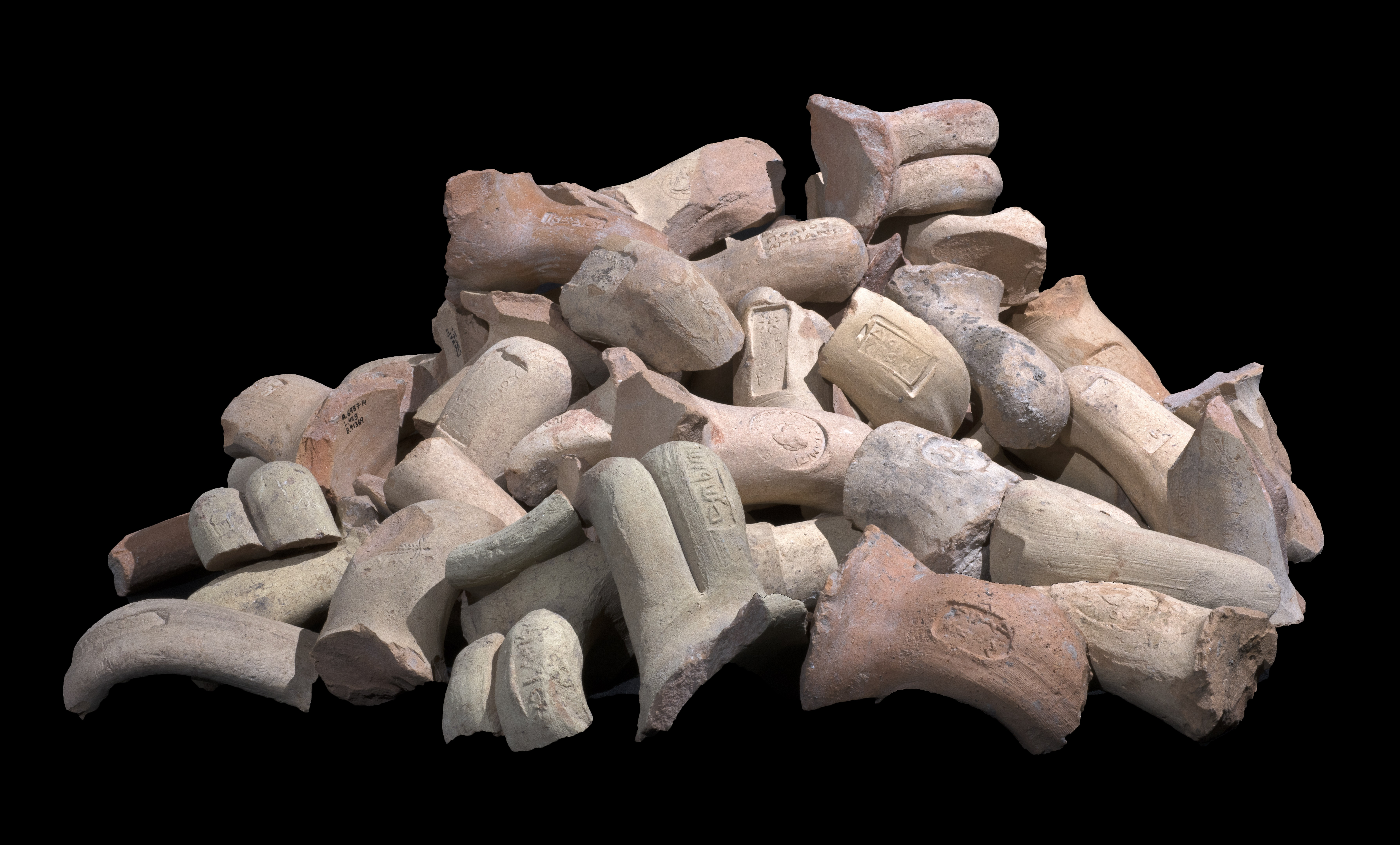 שרידי ידיות קנקני יין ששימשו את יושבי מבצר החקרא